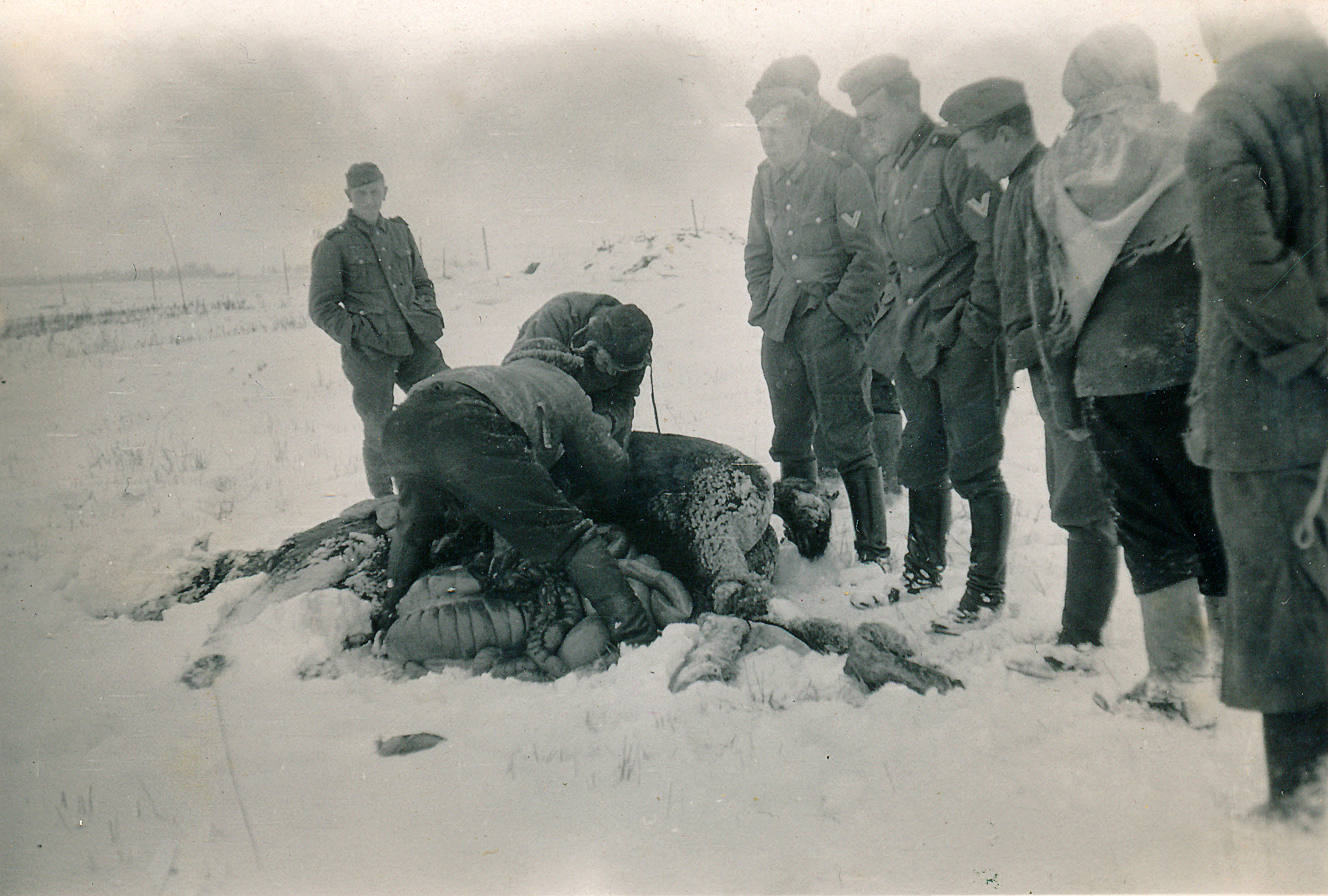 Bilder meines Großvaters, wären der Jahre 1939 bis 1943, Beschreibungen folgen später